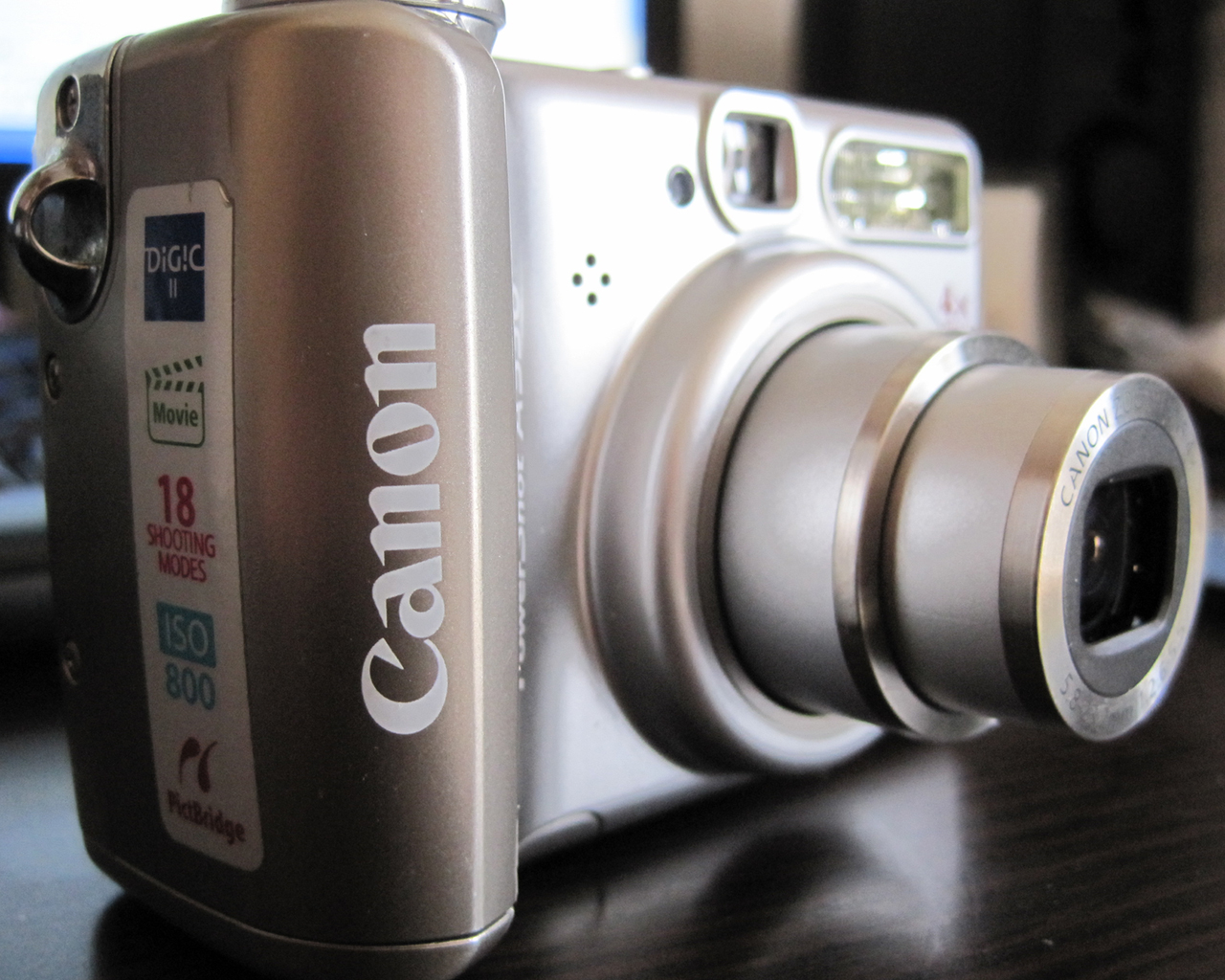 Canon Powershot A530